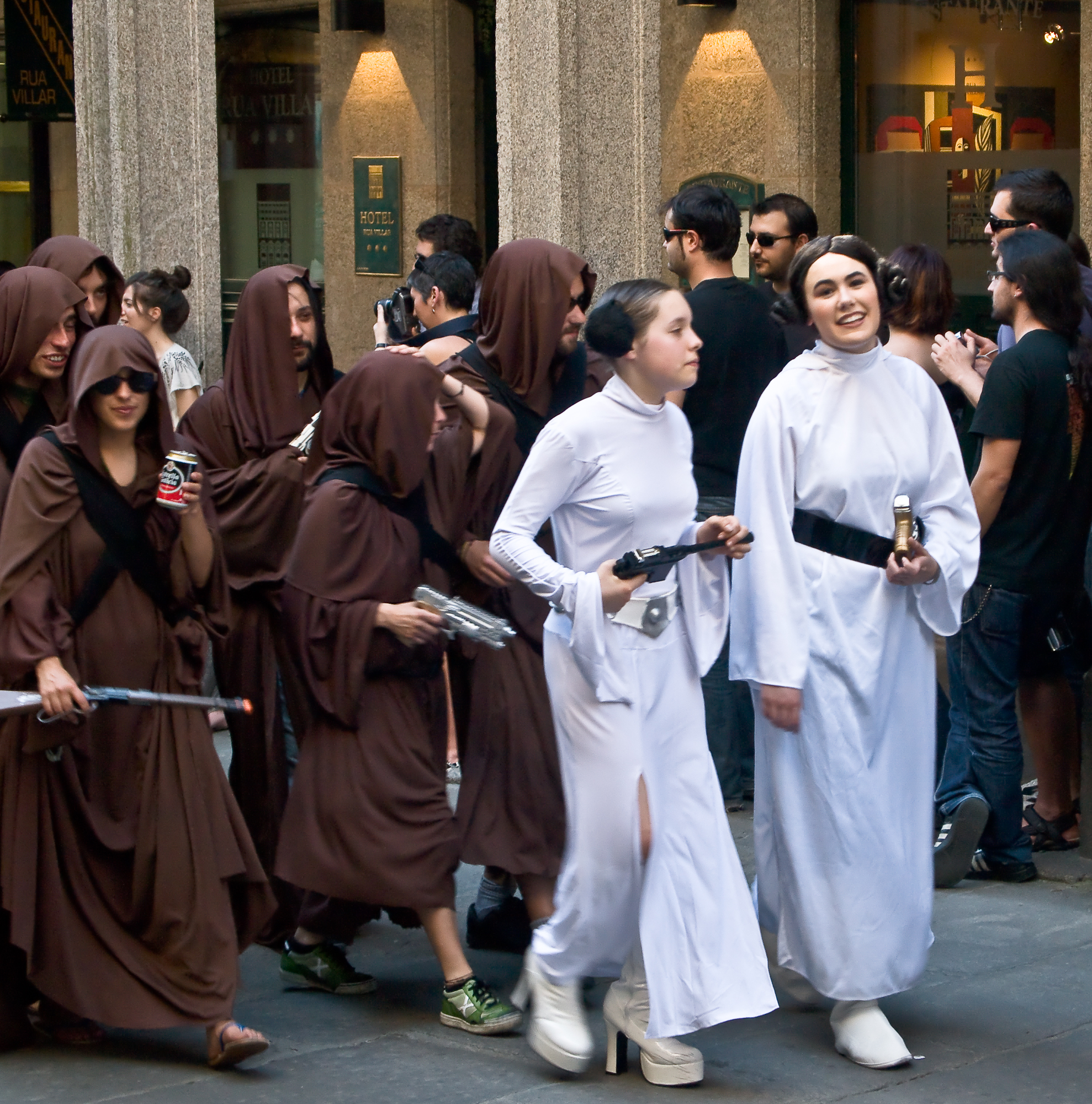 Imperial Stormtroopers. Santiago de Compostela. Star Wars